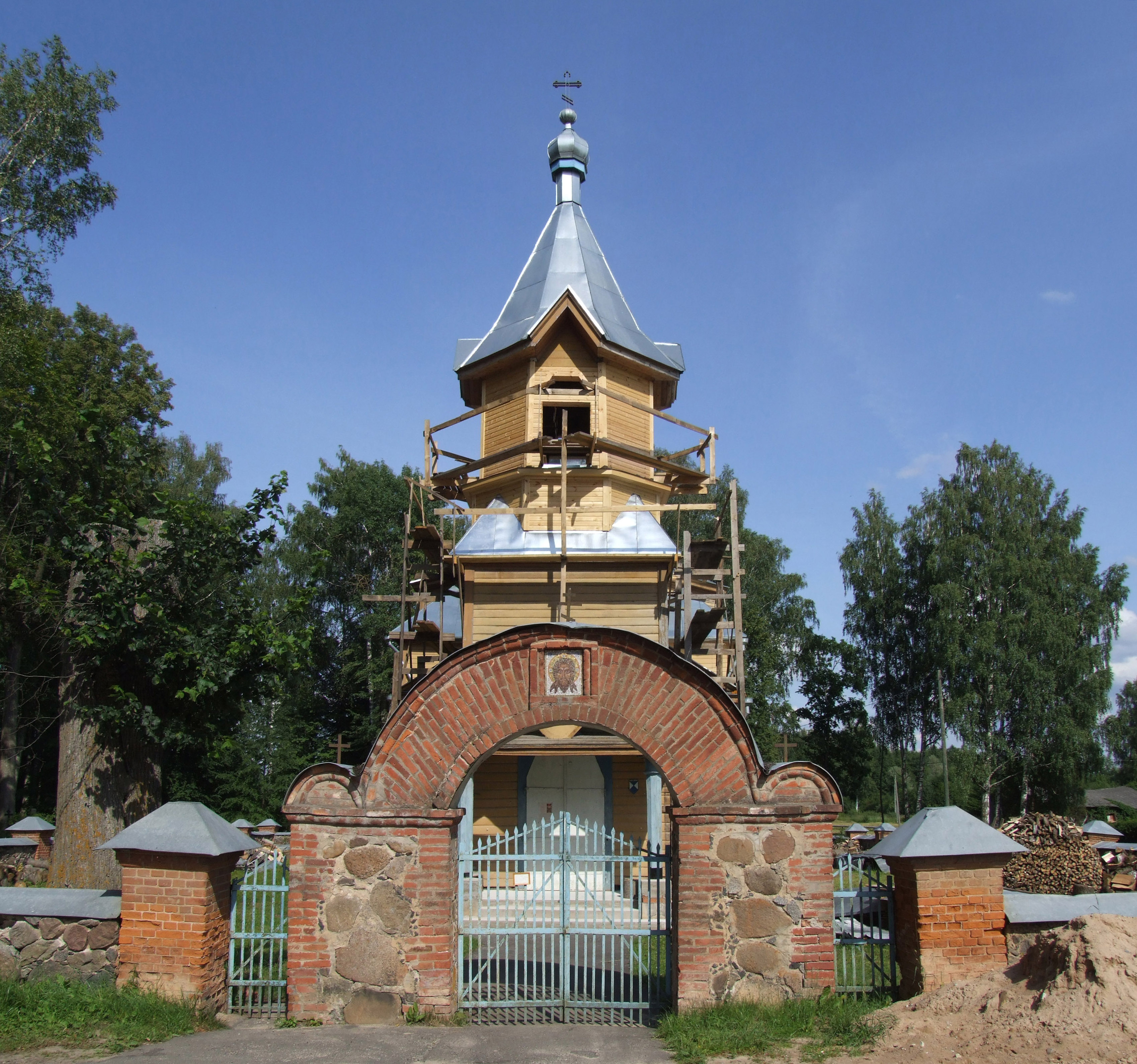 Pūdinovas Vissvētās Dievmātes patvēruma pareizticīgo baznīca, 12.07.2009.